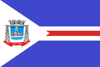 Bandeira de Itapura - SP - Brasil.